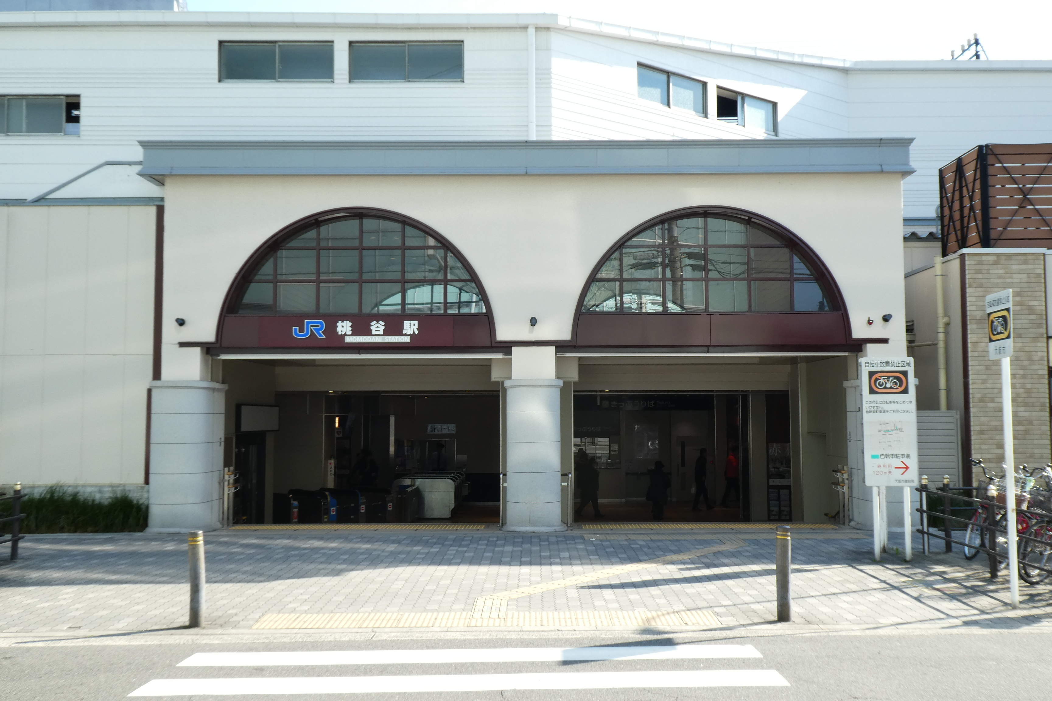 大阪環状線 桃谷駅 西口